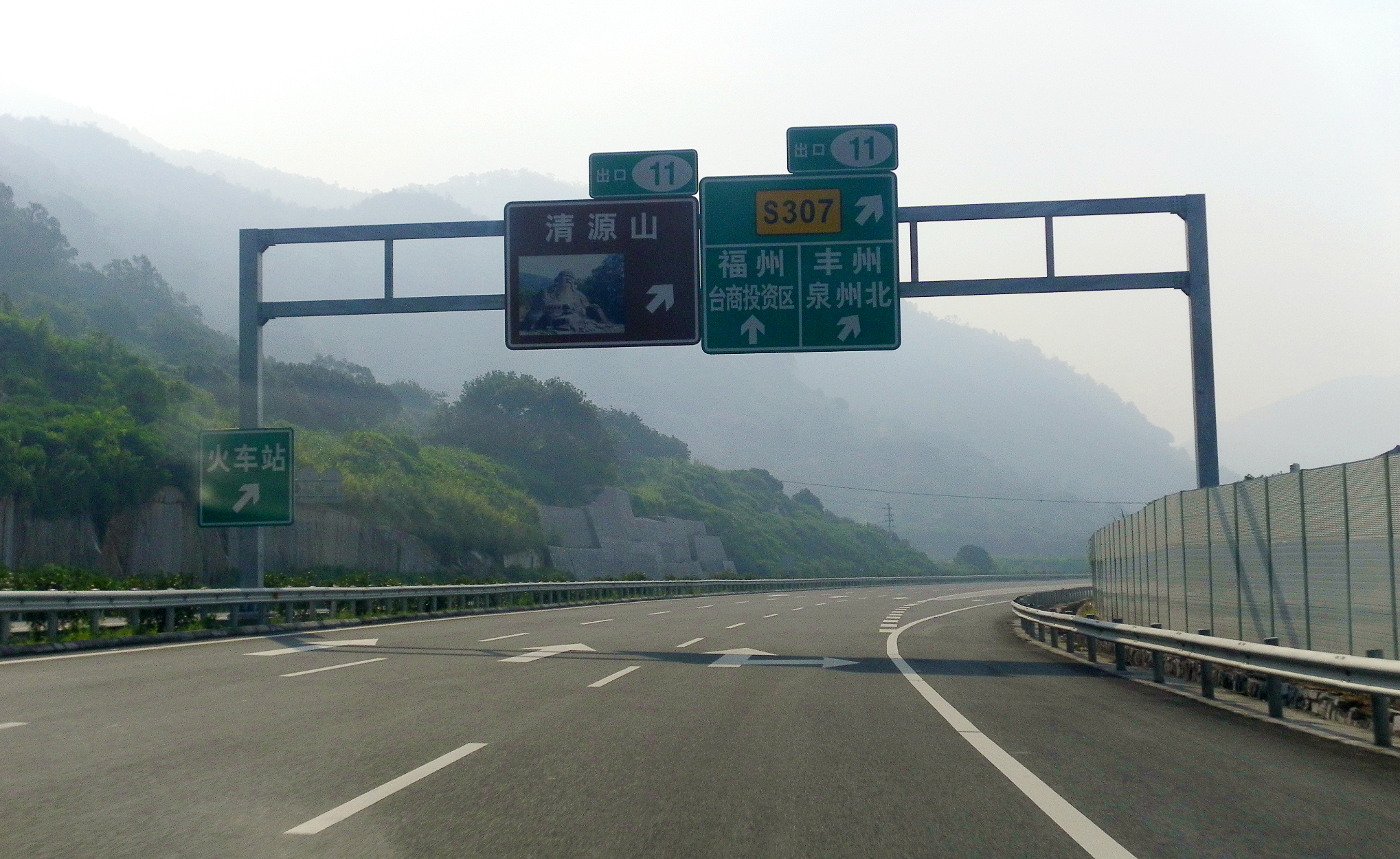 泉州绕城高速南惠段，泉州北出口附近